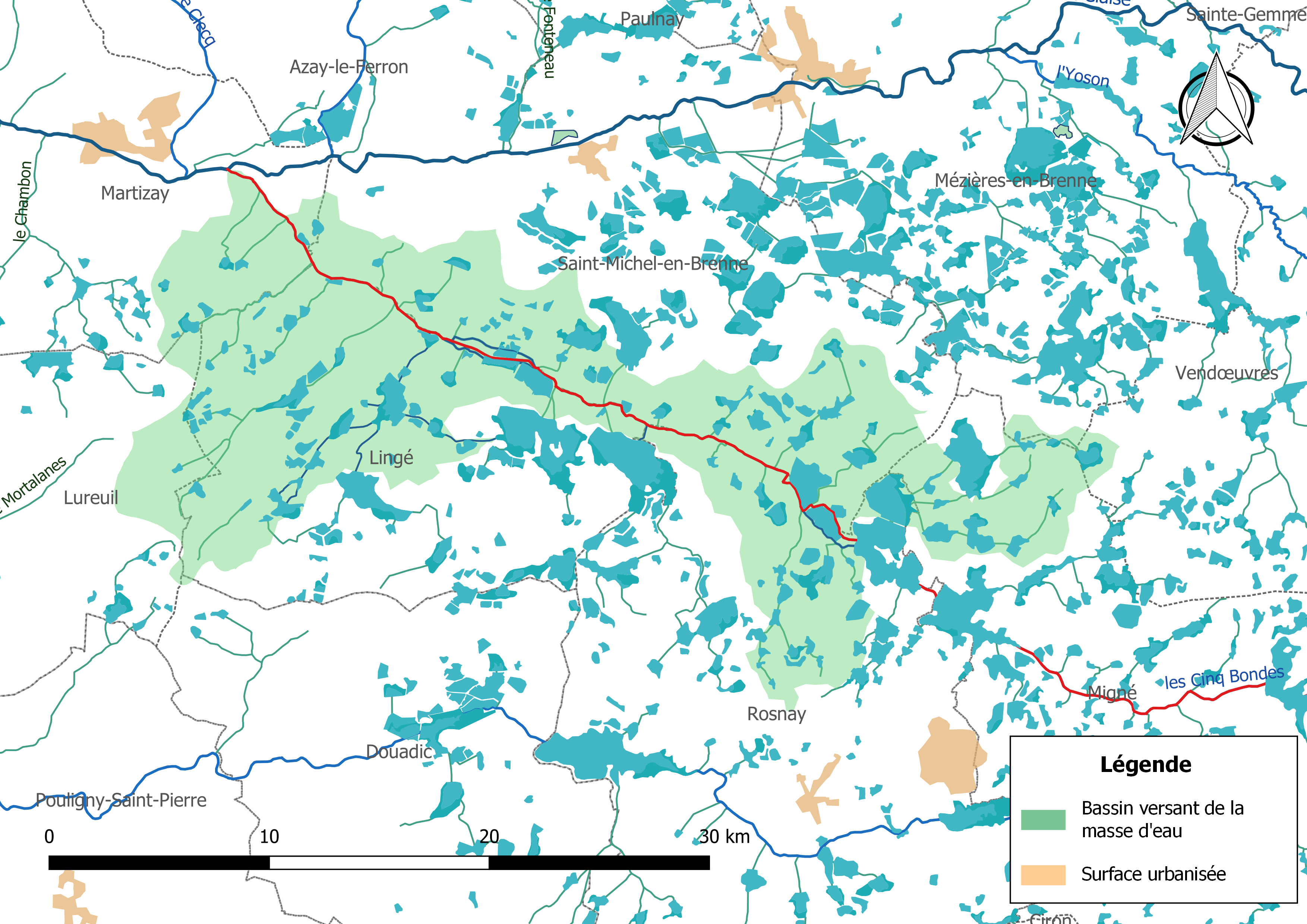 Carte de la masse d'eau « FRGR0428b », avec mise en exergue du cours d'eau « les Cinq Bondes » (en rouge).